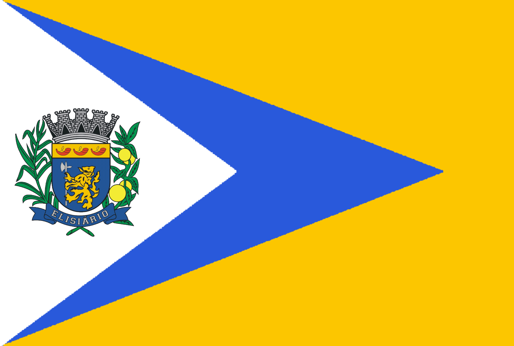 Bandeira de Elisiário - SP - Brasil.